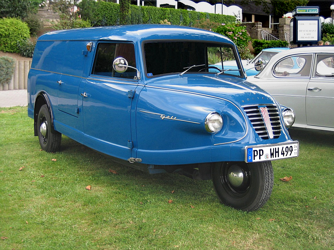 Bildbeschreibung: Goli, Baujahr 1959, 500 cm³, 15 PS Fotograf: Lothar Spurzem Datum: 26.08.2005 beim Borgward-Treffen in Andernach Sonstiges: Dreiradlieferwagen der Goliath-Werke Bei der Ortsangabe ist eine Abweichung von etwa 100 m sowohl in die eine wie die andere Richtung möglich.